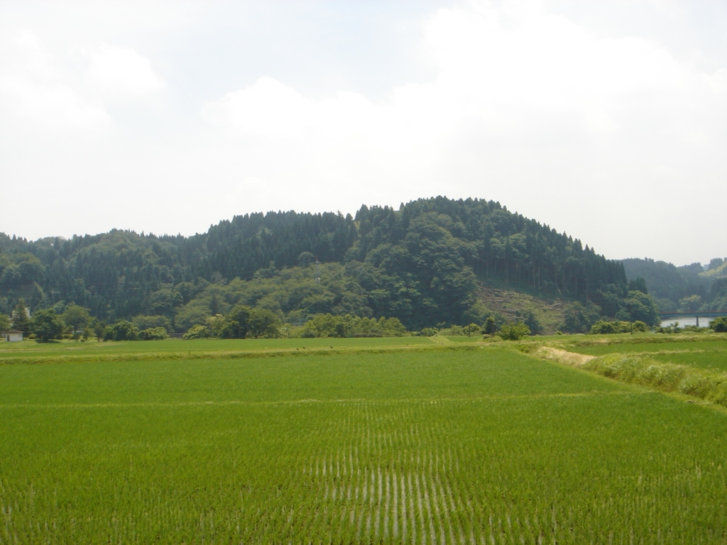 増山城近景 西方向（城下町）から 2007年6月19日投稿者撮影 Masuyama Castle Site, Tonami, Toyama, Japan